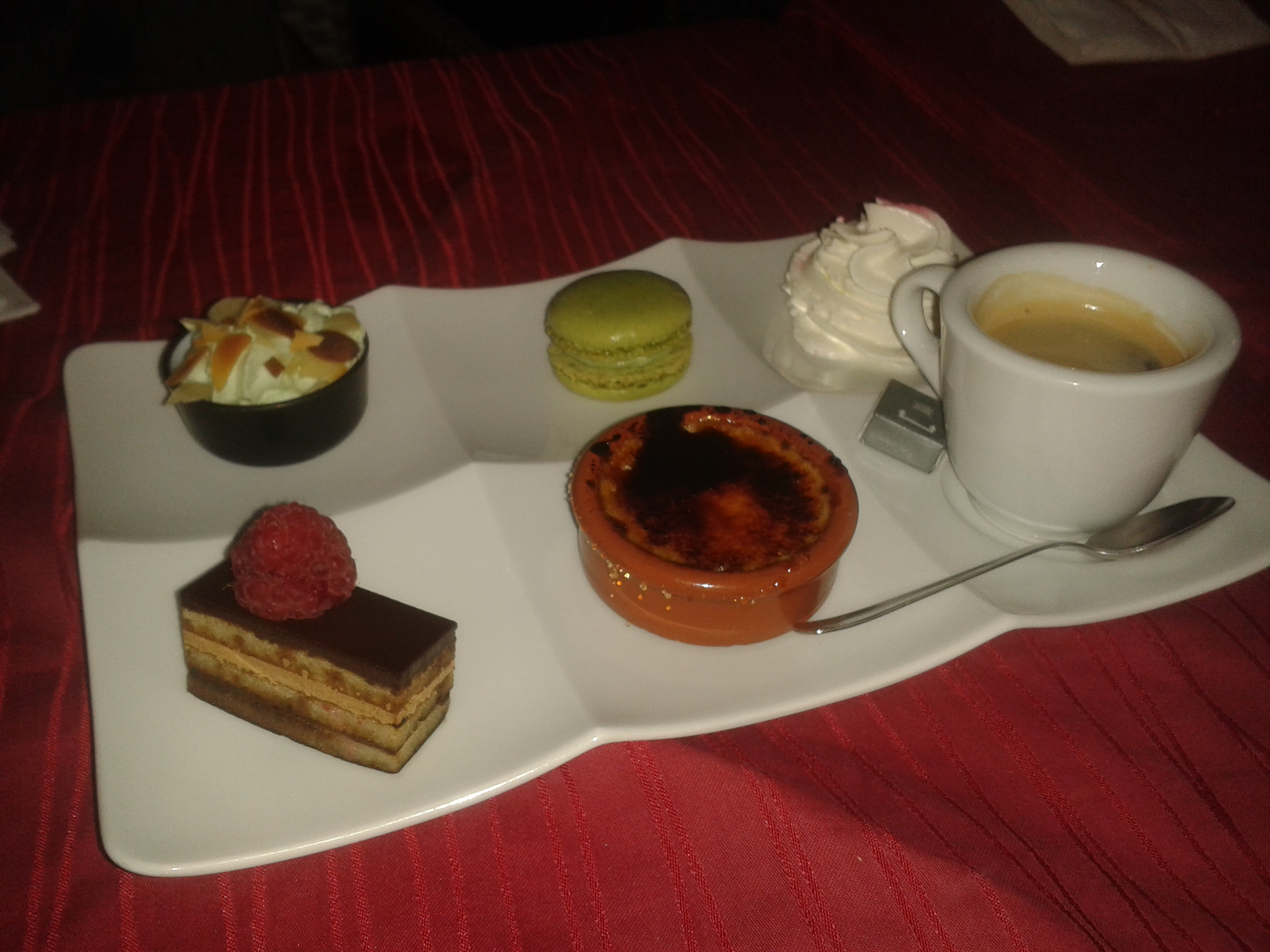 Café gourmet